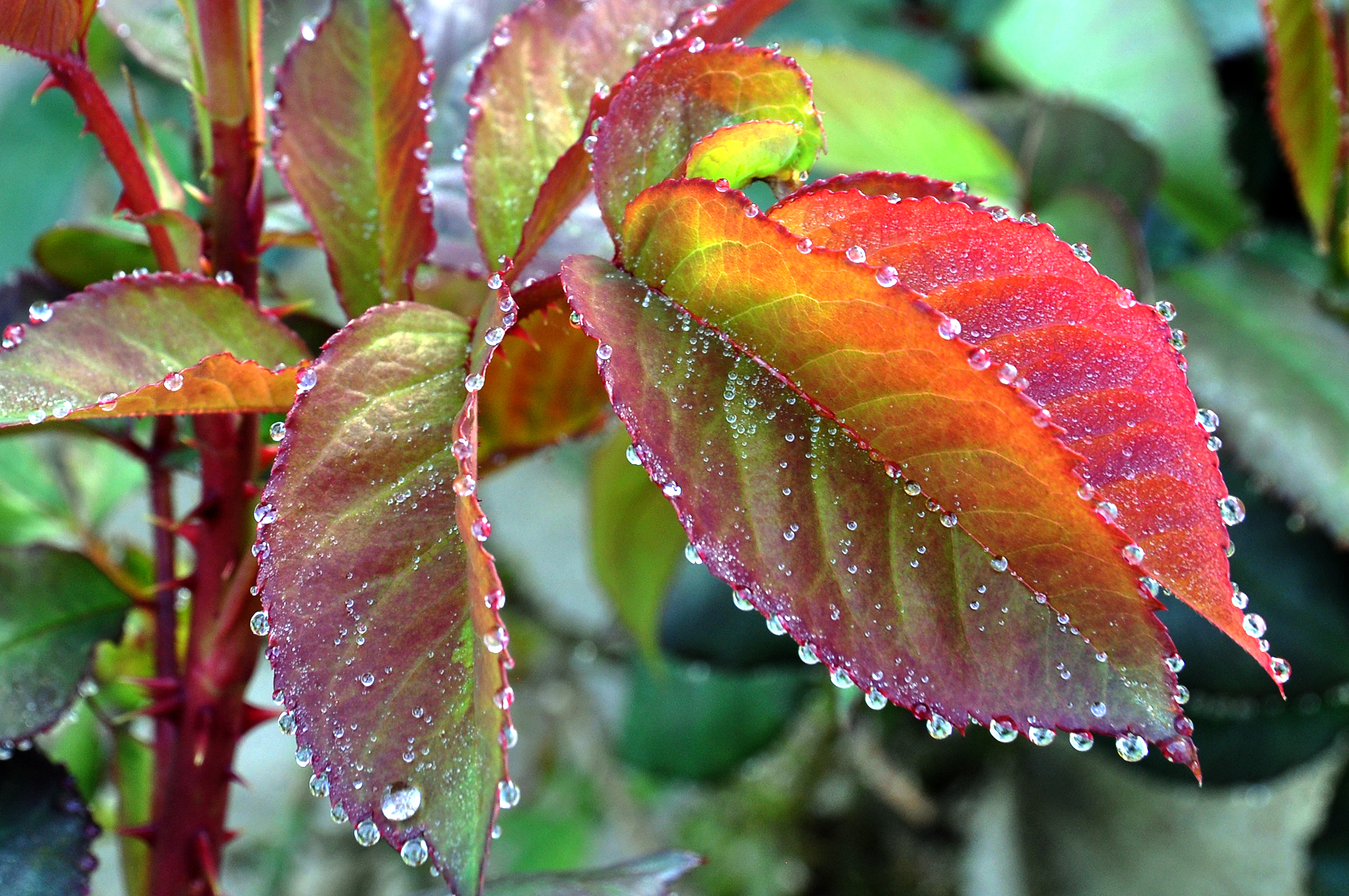 Un matin du mois d'avril 2019, en Ile-de-France, guttation sur les feuilles d'un rosier.